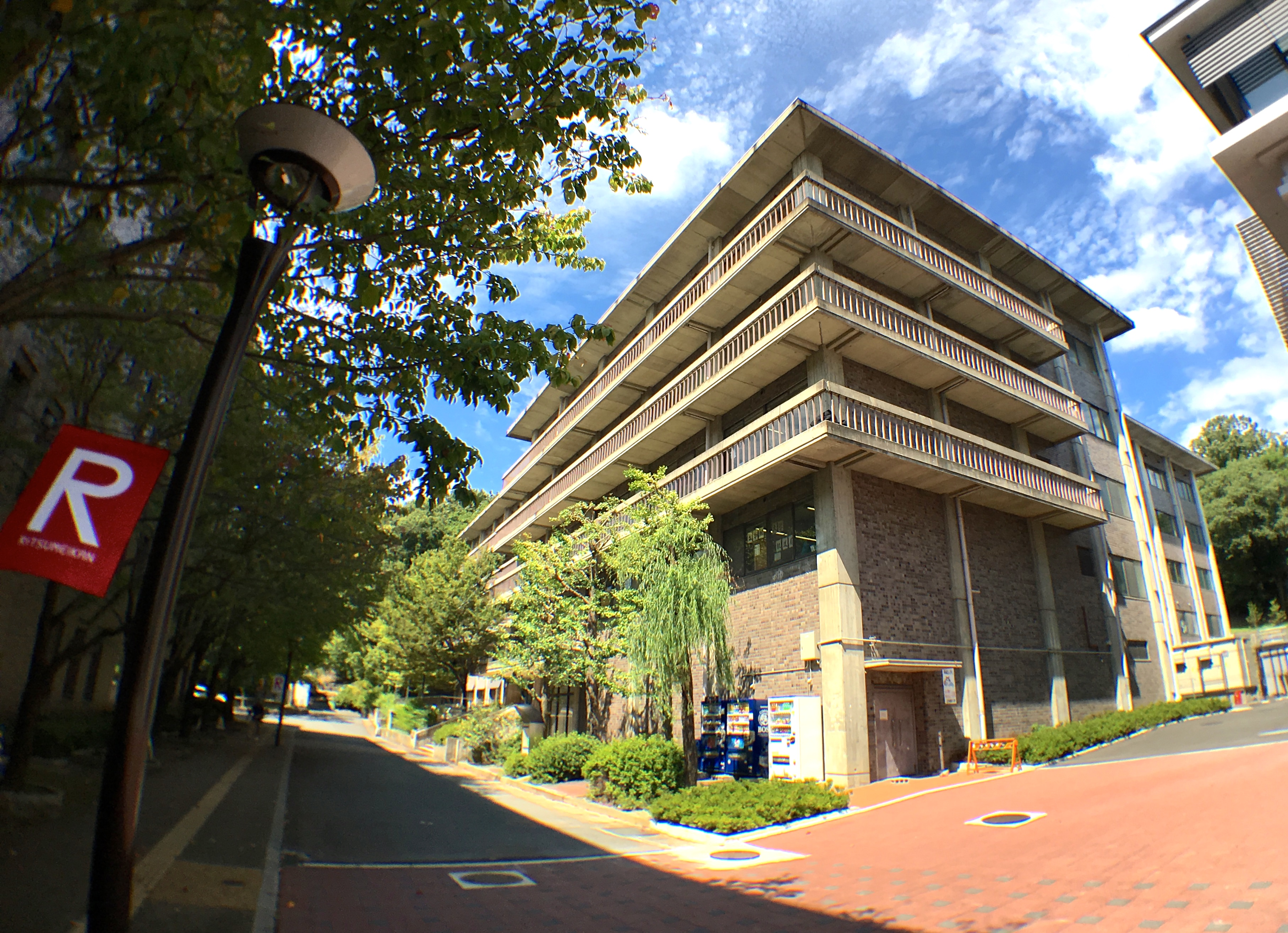 The photo was taken by me on September 10, 2016.